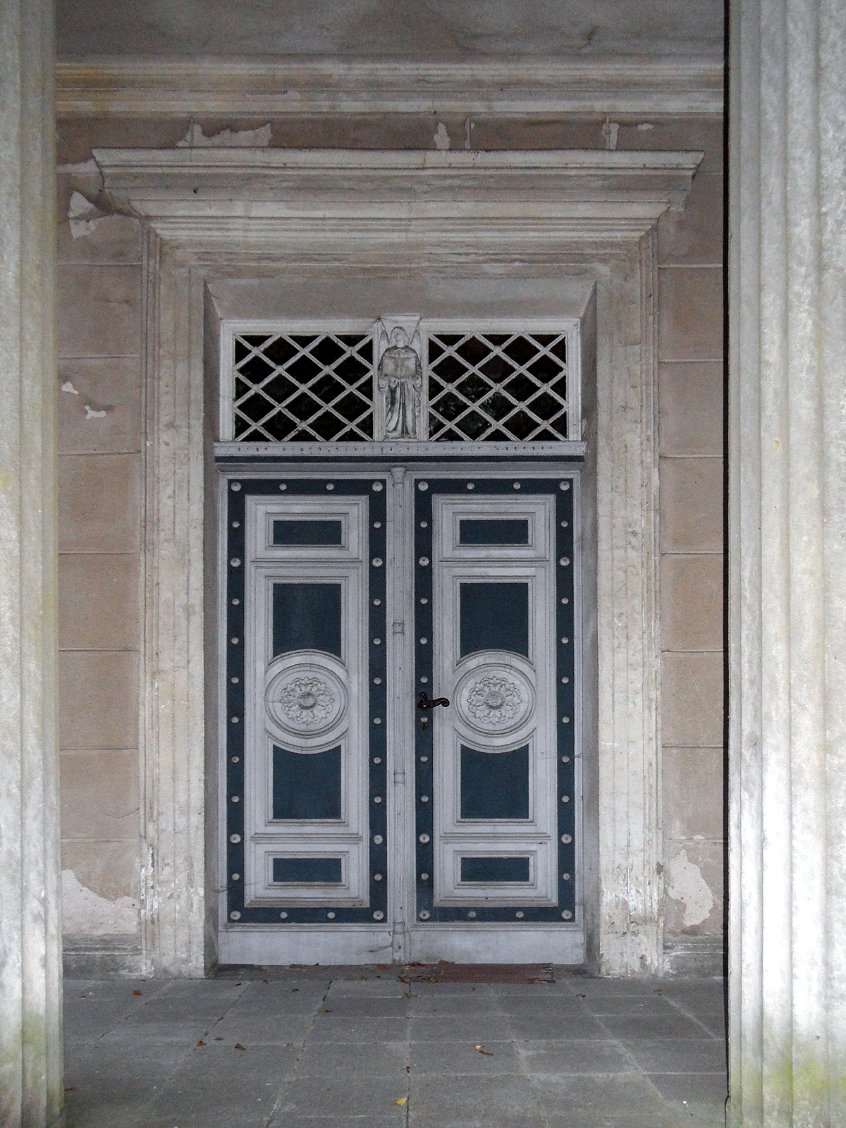 Portal des vormaligen Mausoleums der Fam. von Eickstedt (seit 1897 Dorfkirche Koblentz) Datum: 19.08.2011 Urheber: onnola (Flickr-User) Quelle